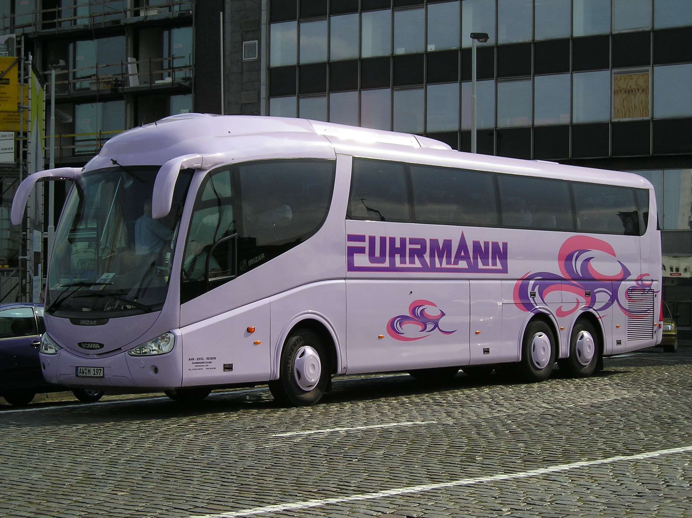 Međugradski autobus.